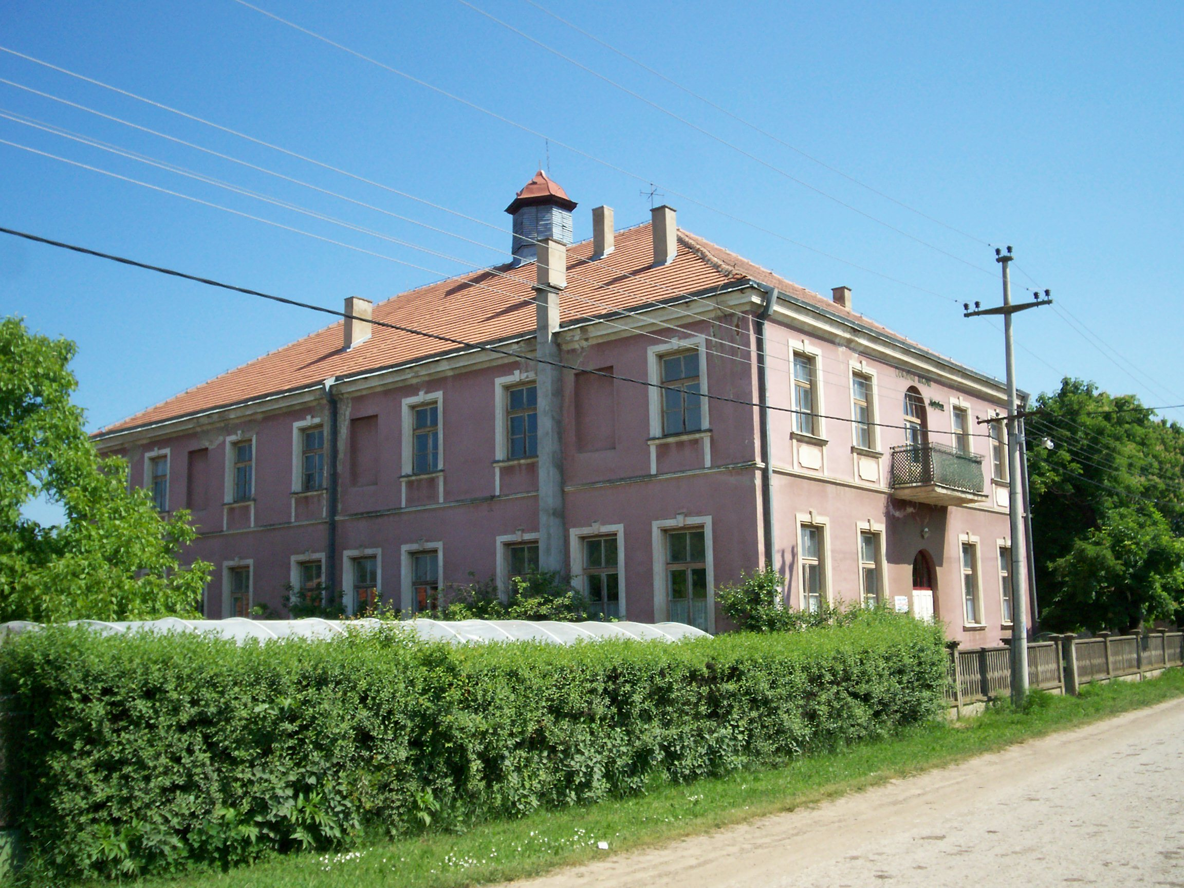 Основна школа Вук Караџић.